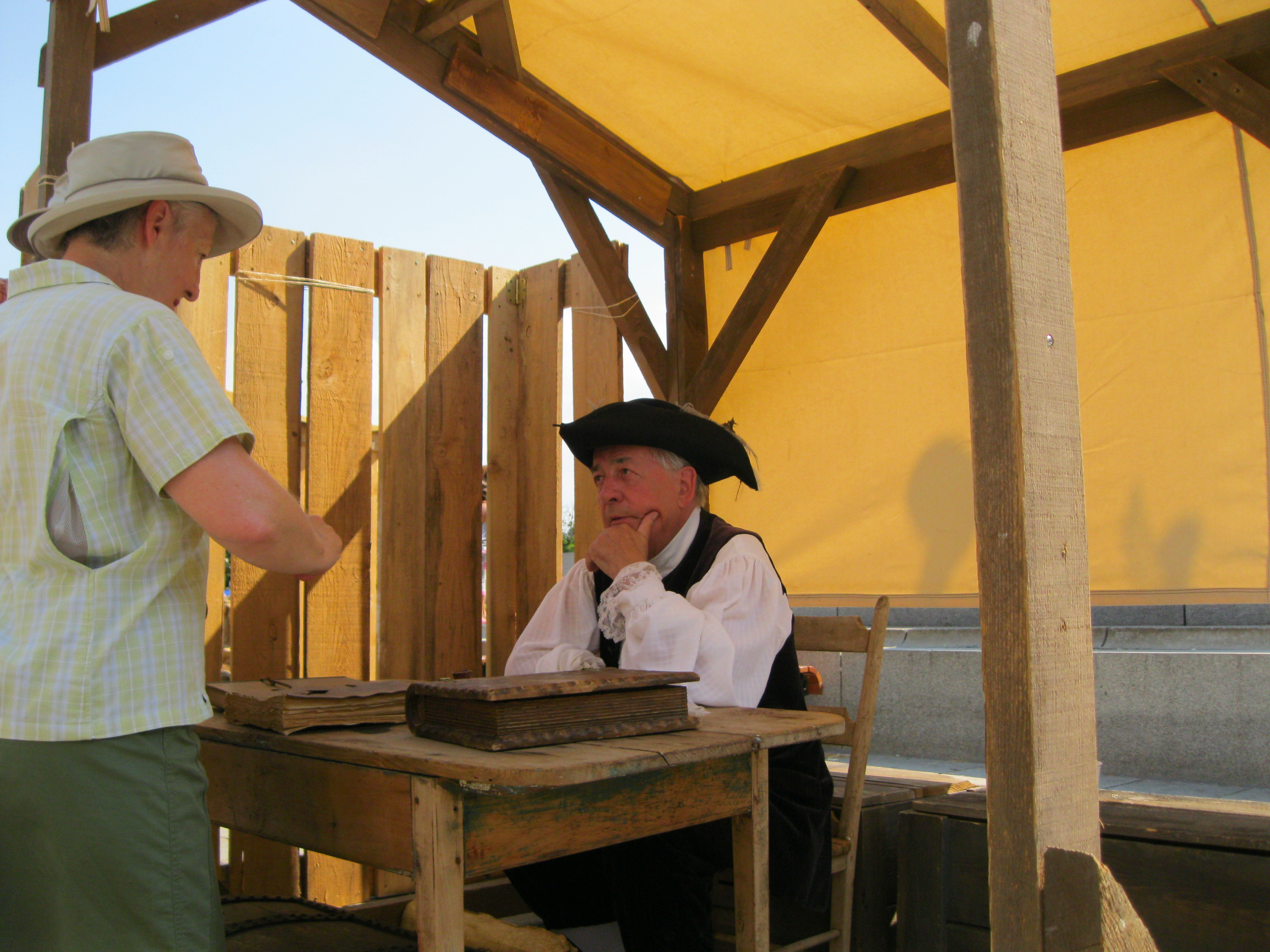 Marché public de Pointe-à-Callière dans l'ambiance du 18e siècle, édition 2012